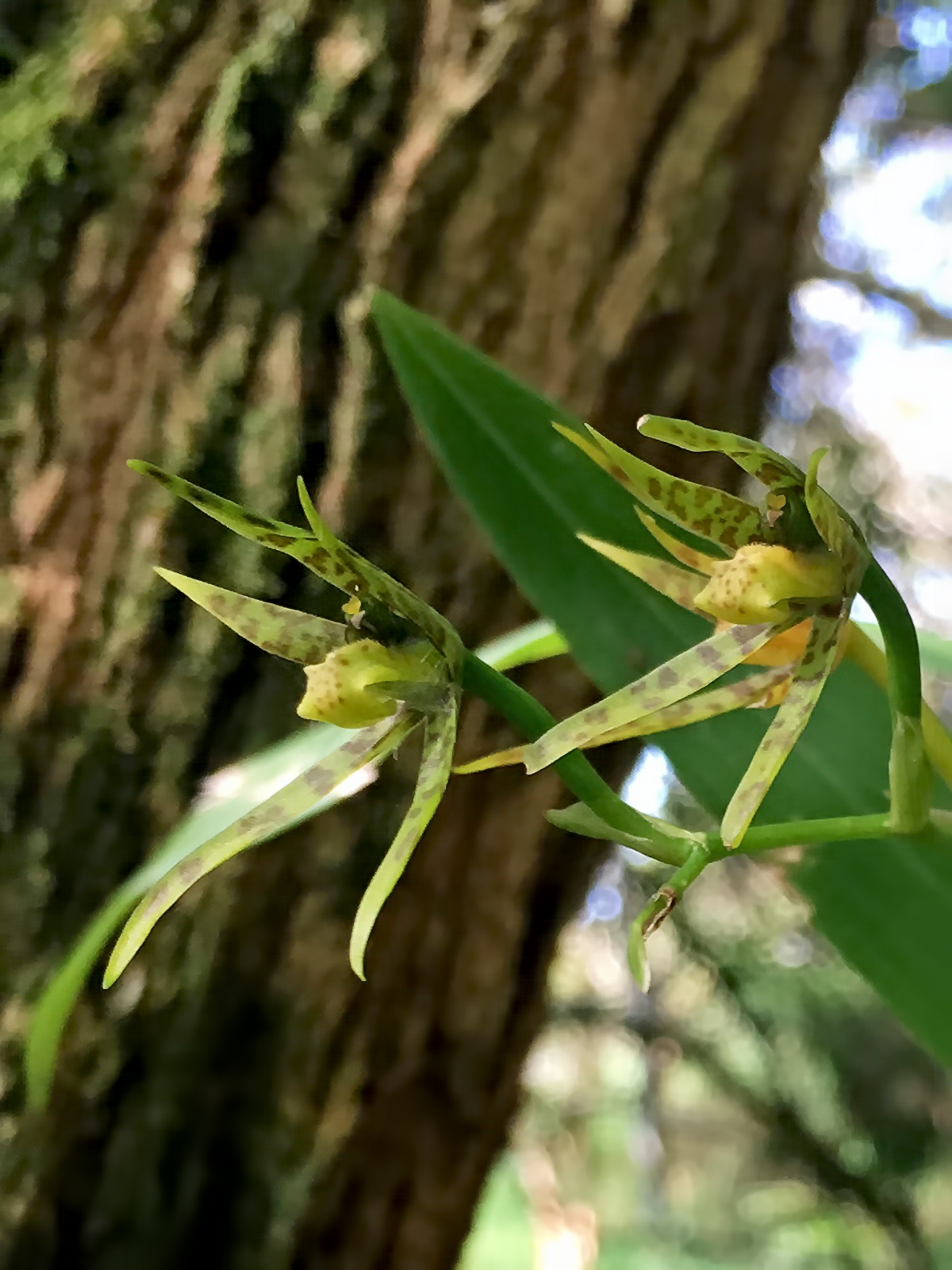 Ada chlorops